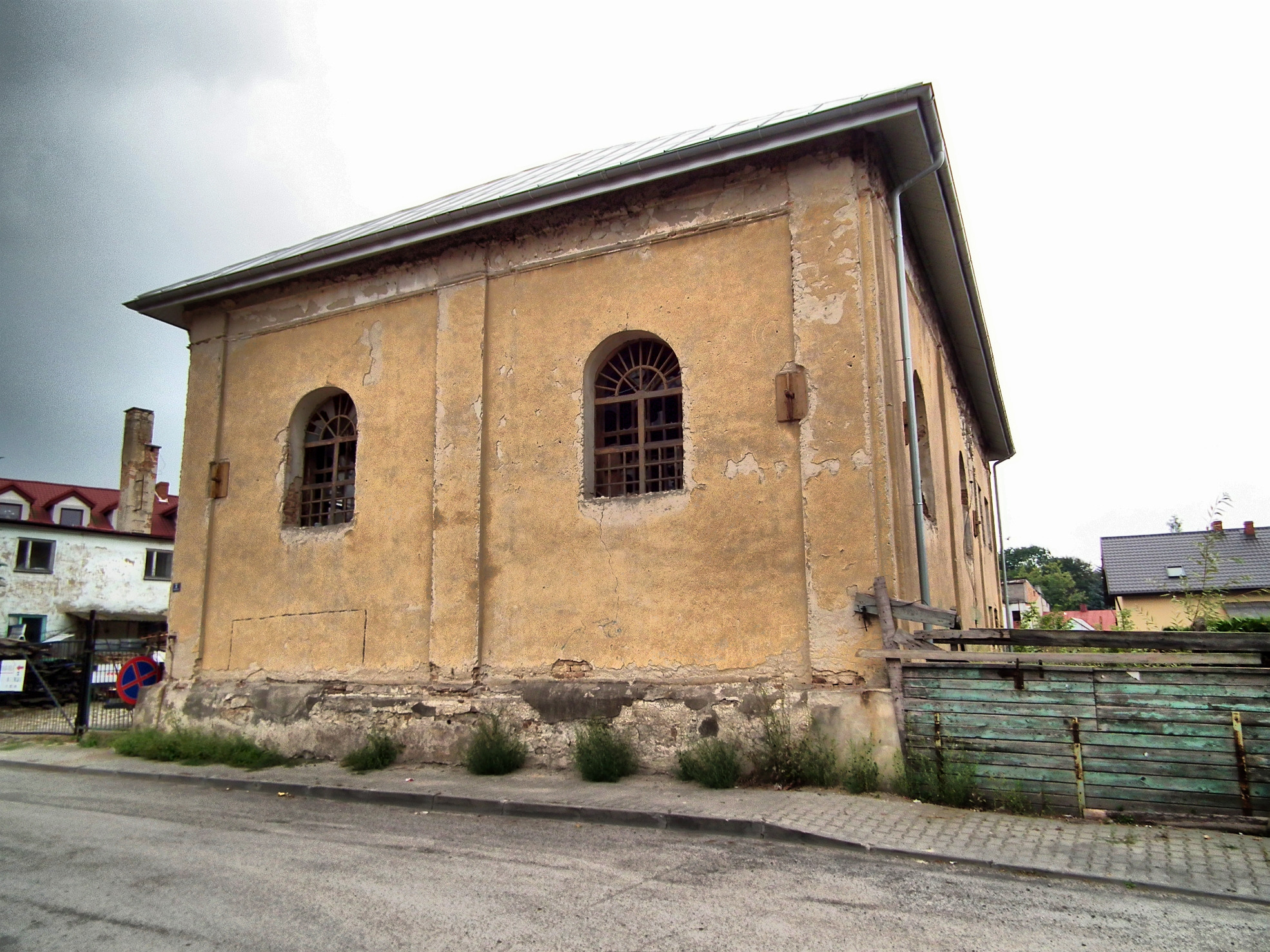 Bychawa, synagoga, ob. remiza, 2 poł. XIX